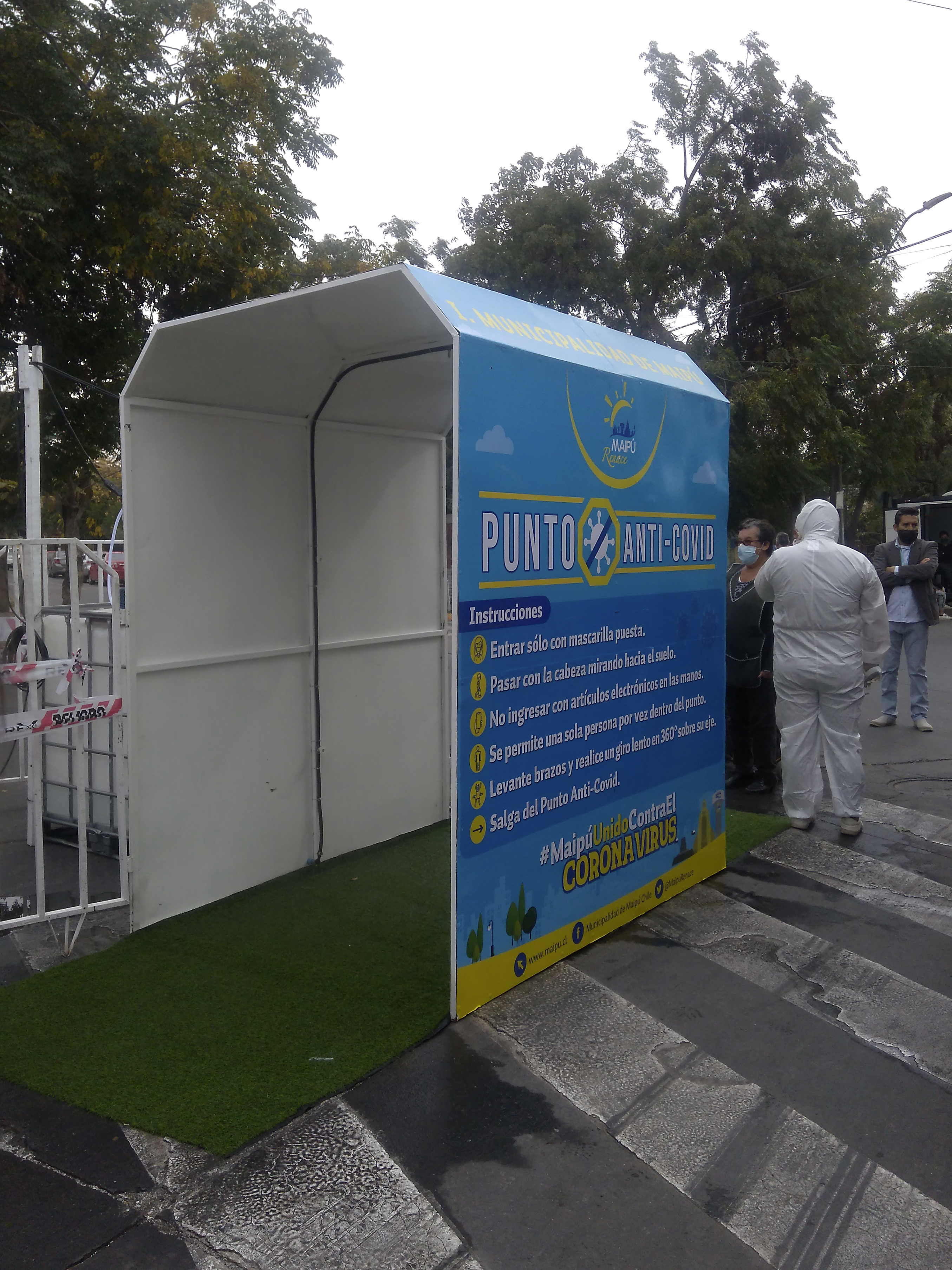 Un túnel sanitizador (o punto anti COVID-19) instalado por la Municipalidad de Maipú en el acceso norte de la Feria Padre Hurtado. El dispositivo utiliza ácido hipocloroso para desinfectar a las personas que pasan por él.